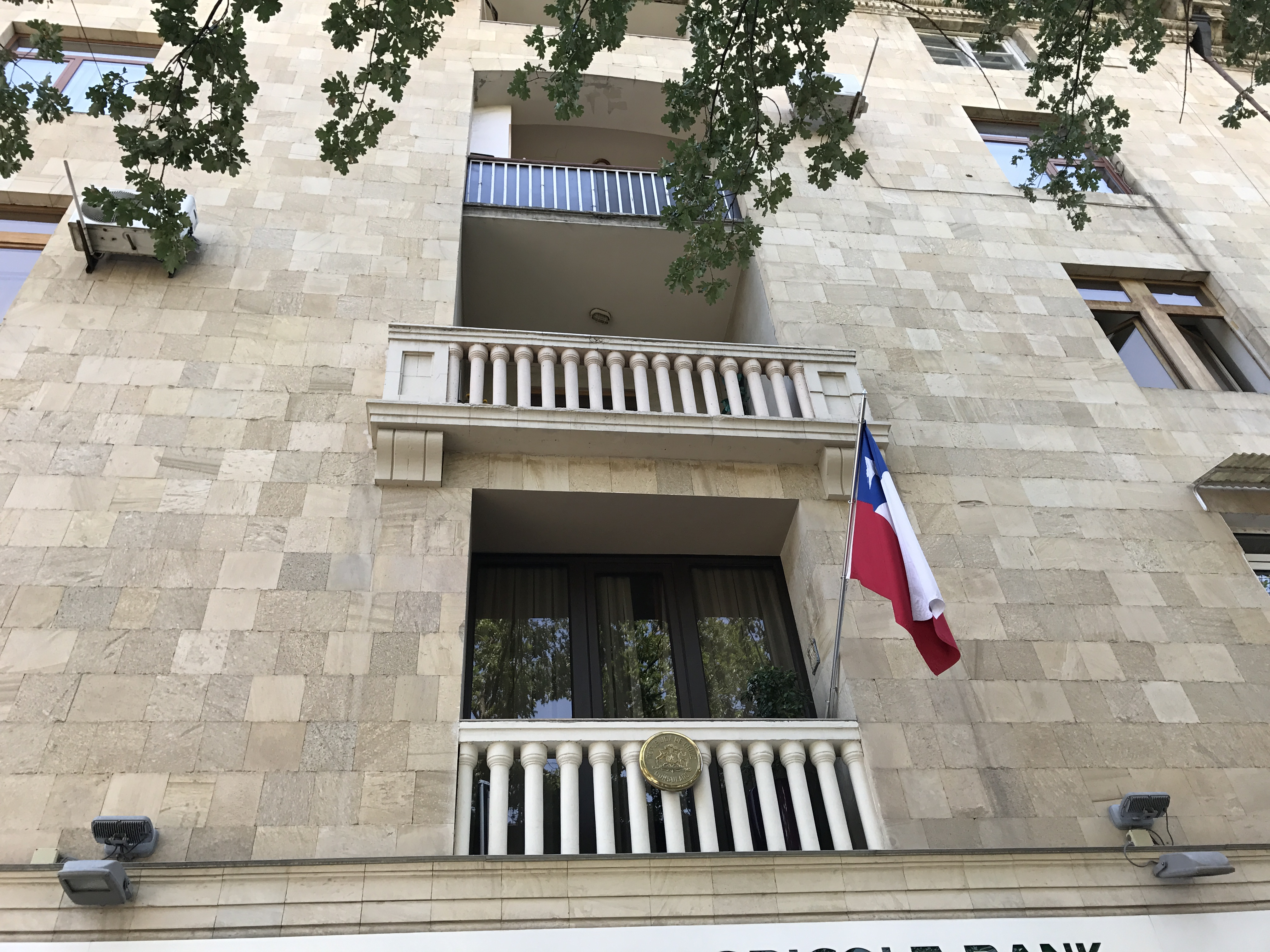 Image d'Arménie en juillet 2017.